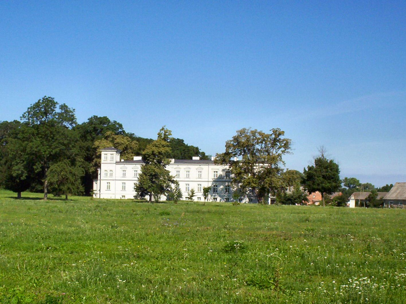 Pałac w Koszewku (gm. Stargard Szczeciński)